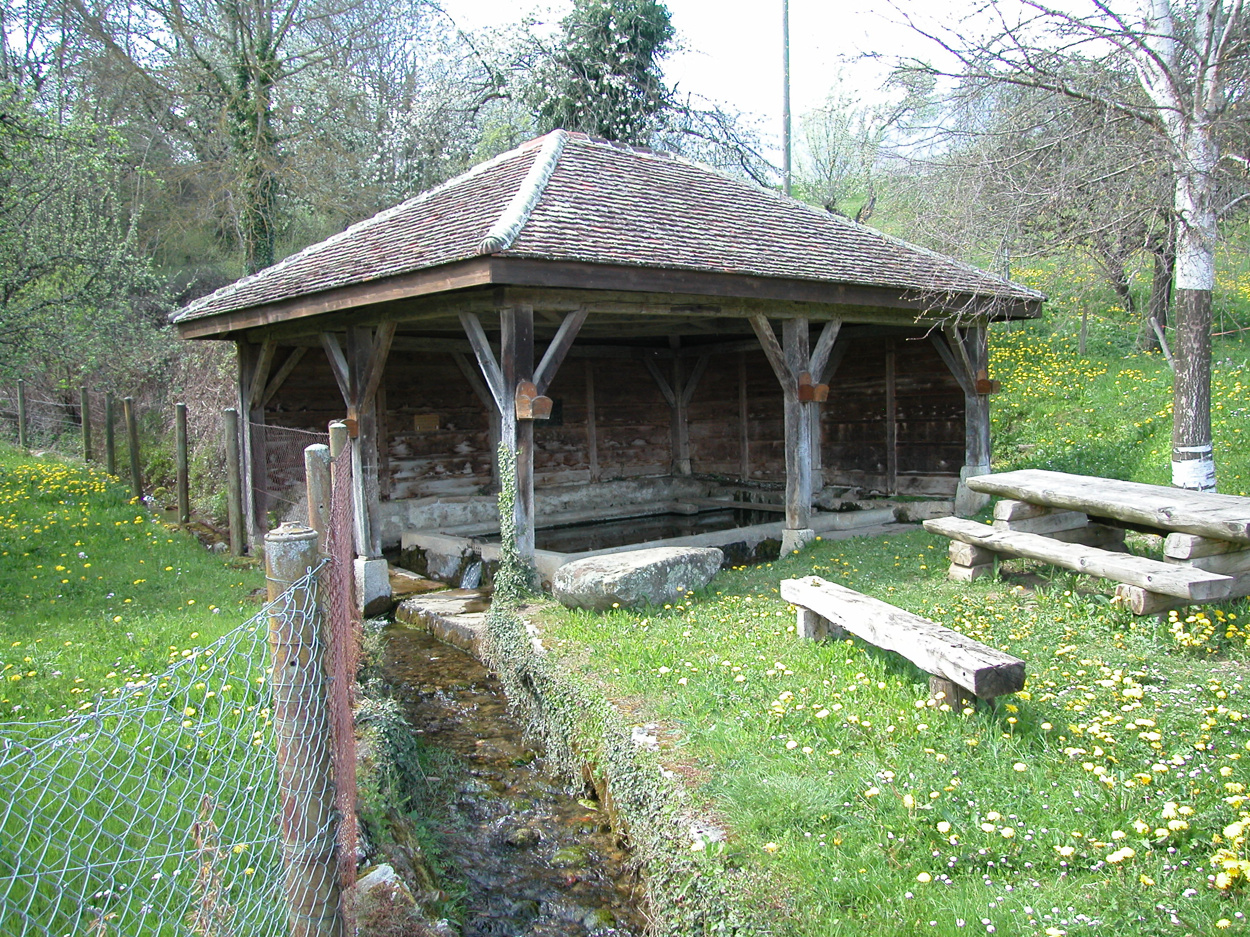 Ancien lavoir de la Brénaz